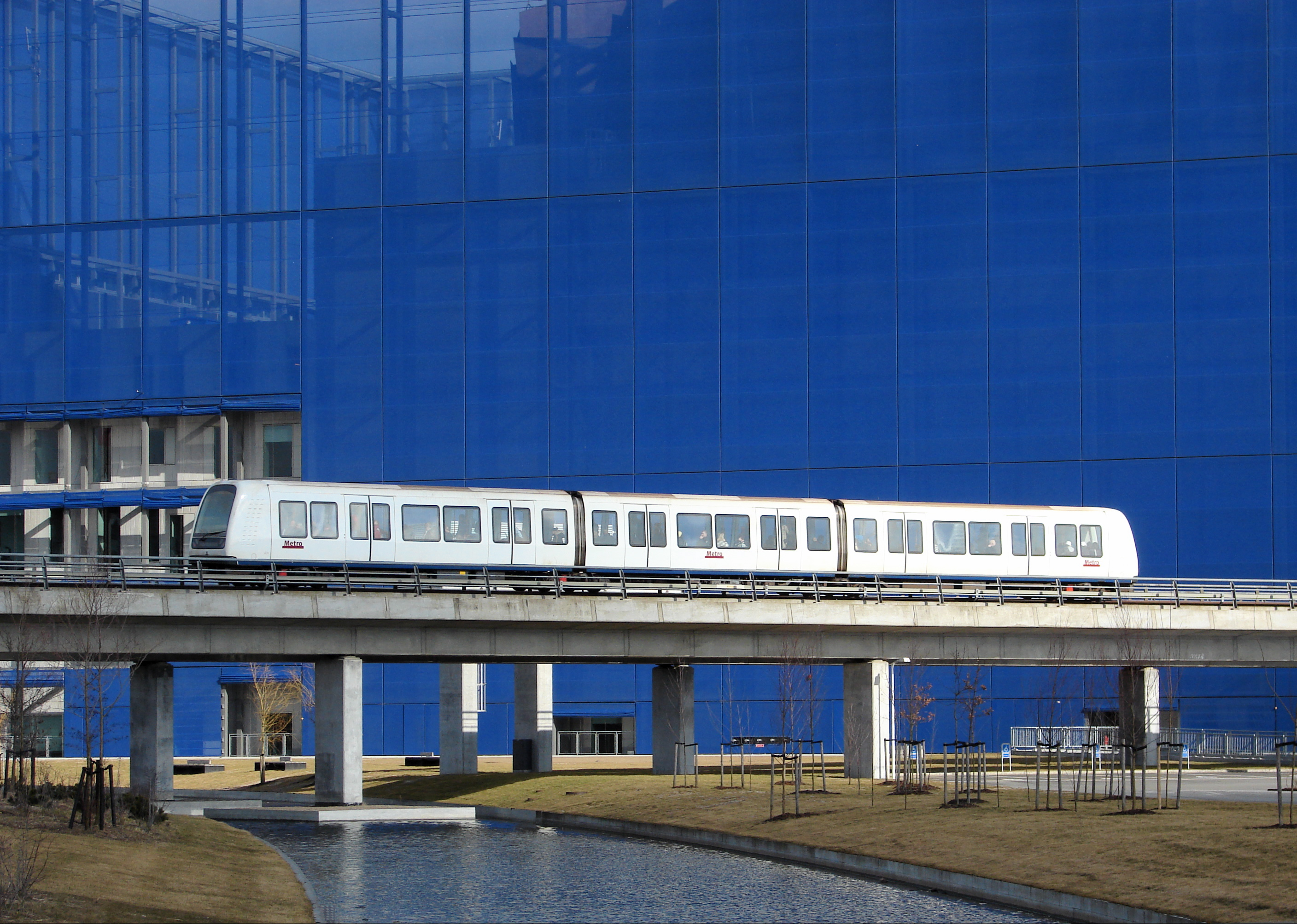 Metrovogne ved DR Byen Station, Ørestad, Amager ved København